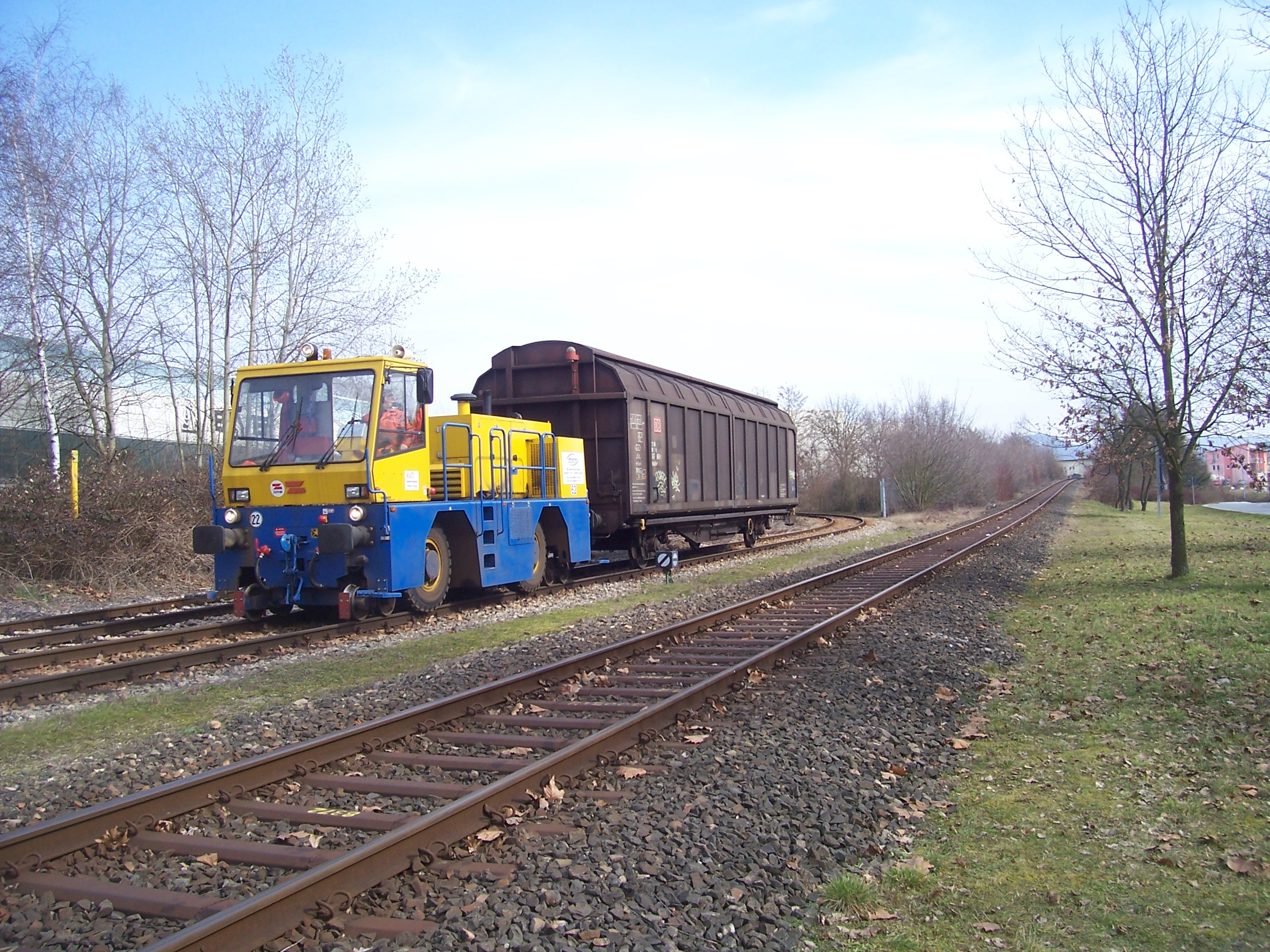 Ein Zephir-Zweiwegefahrzeug der Rhenus Rail St. Ingbert GmbH beim Rangieren in Viernheim.